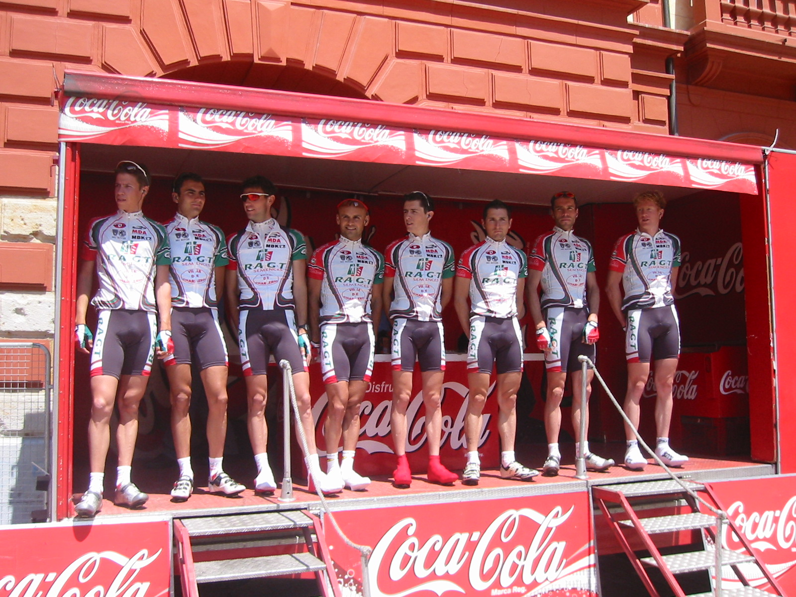 R.A.G.T. Semences, Euskal Bizikleta 2005